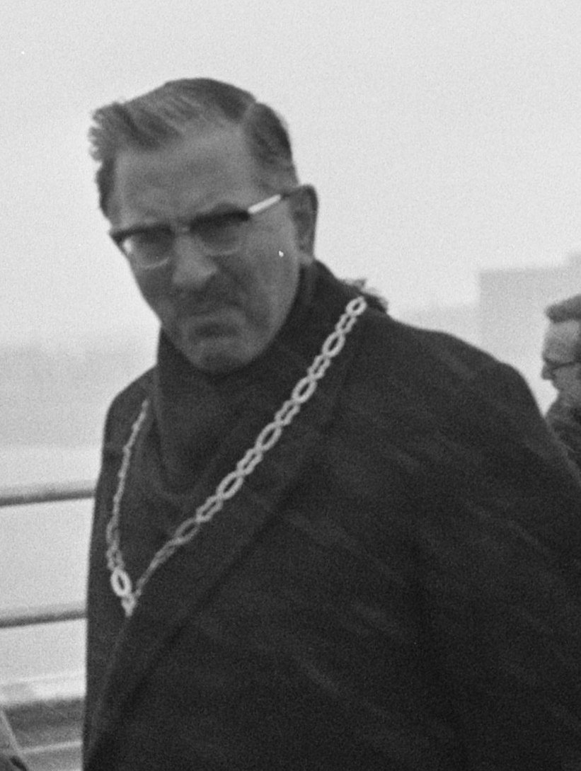 Prins Claus opent nieuwe E-8 weg (Hoevelaken - Holten), in de regen Burgemeester Bolkestein van Devent Claus en Minister De Koster